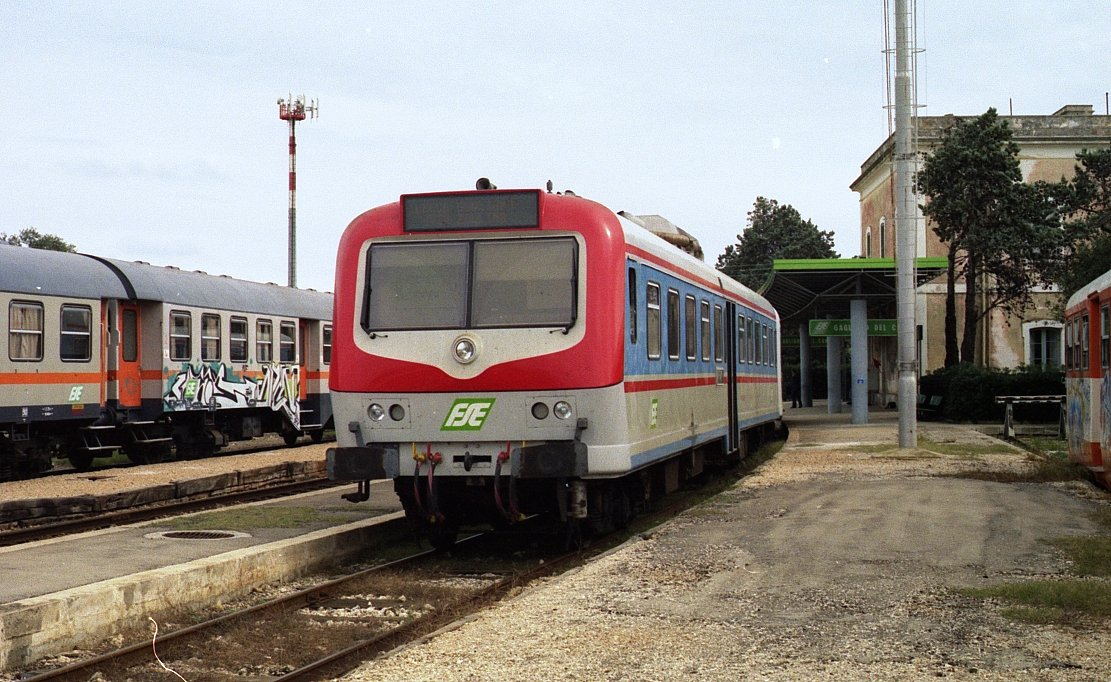 Automotrici della serie 121 ÷ 130 delle Ferrovie del Sud Est in sosta a Gagliano